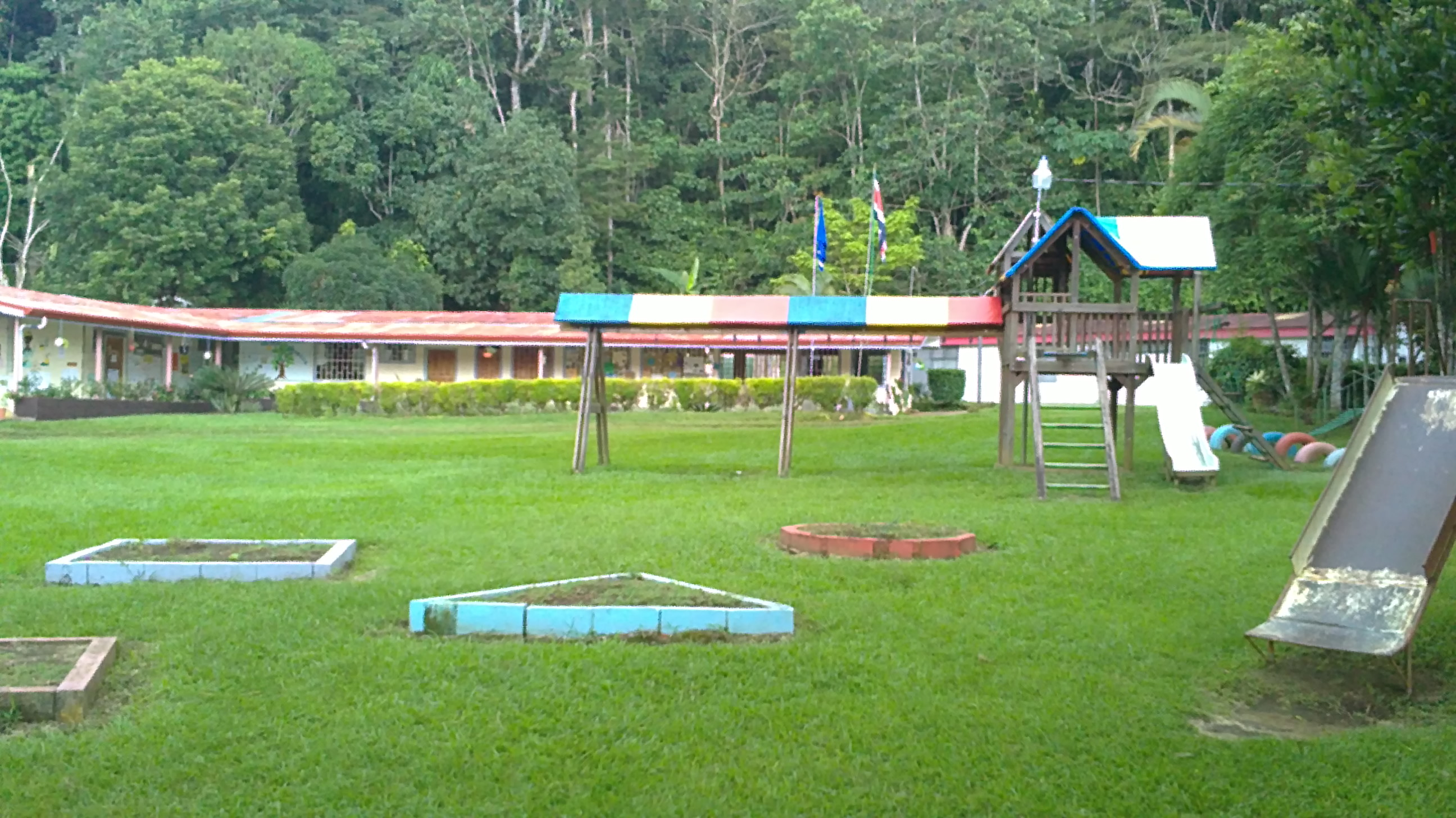 Escuela Científica UNA SRB PZ